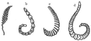 Verschiedene Stickmuster: a Plattstich, b Kettenstich, c Languettenstich, d Doppelfestonstich.